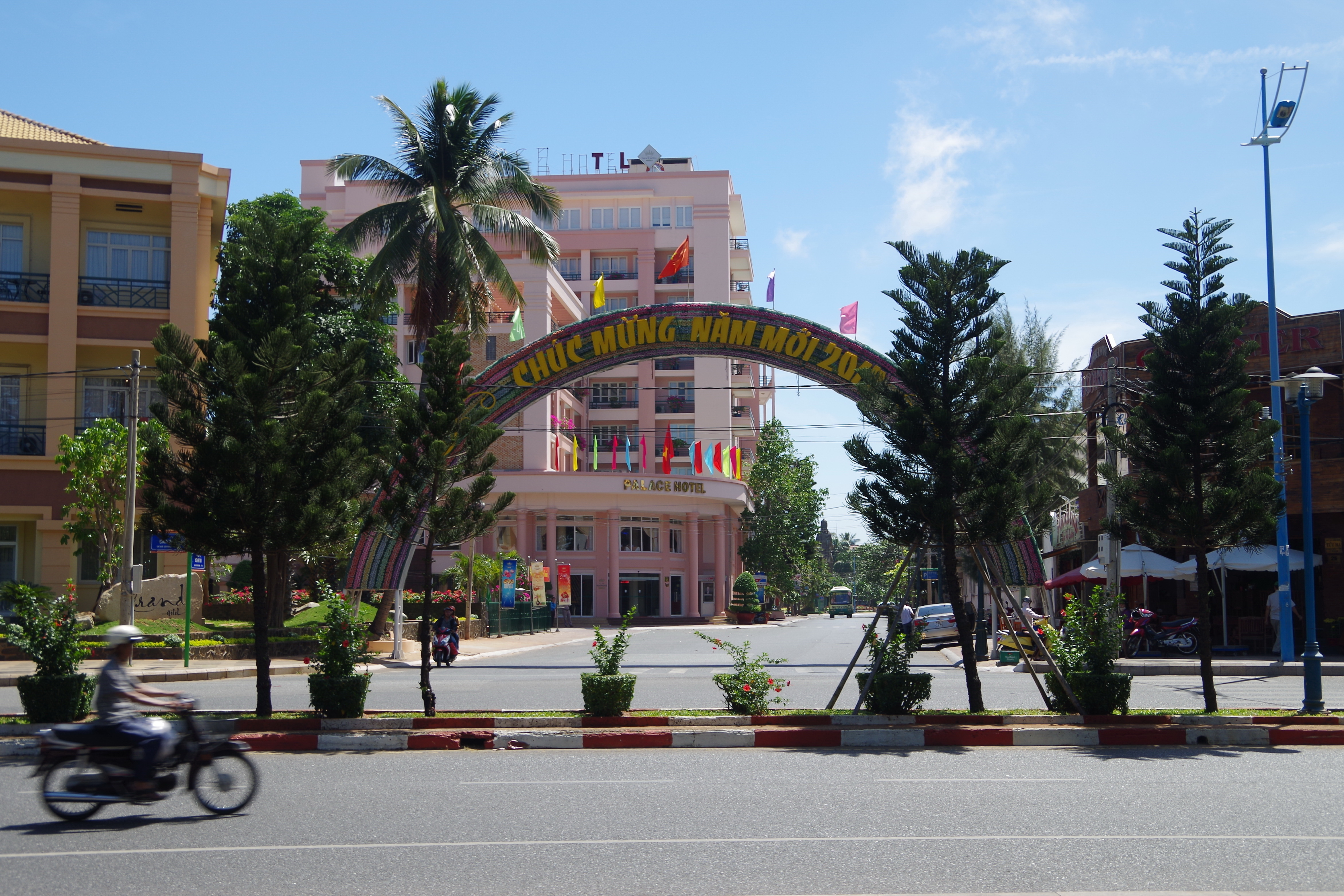 Vung Tau